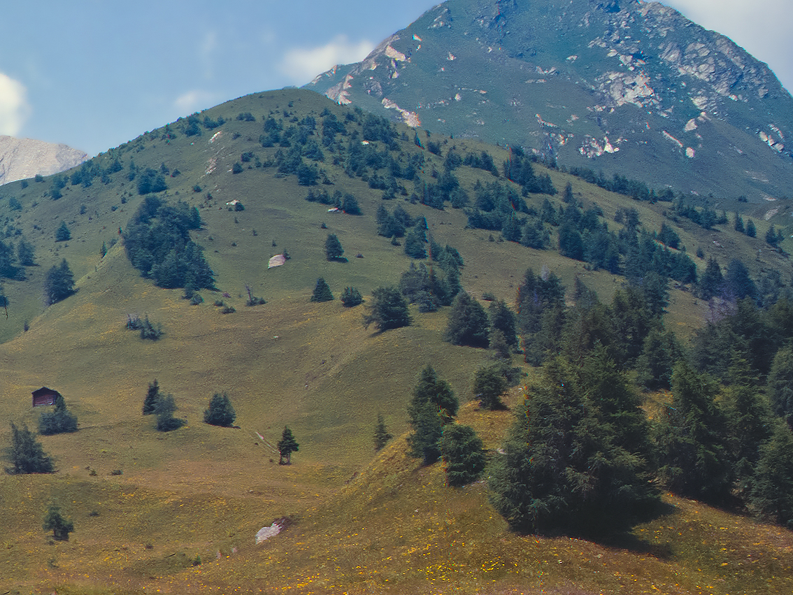 Waldgrenze im Gebirge Osttirols